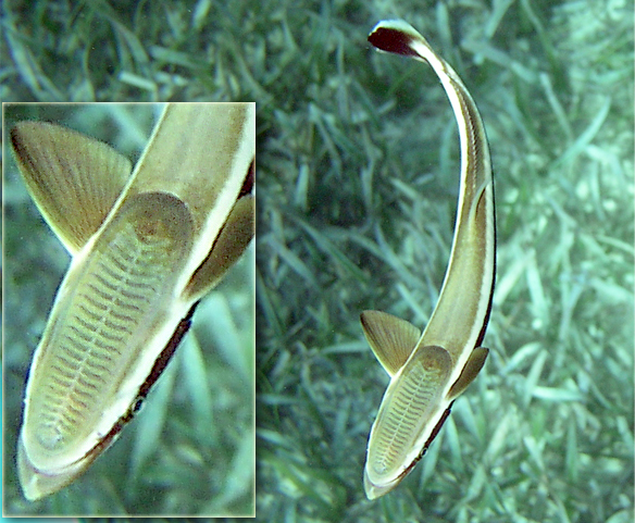 Remora, Belize Barrier Reef